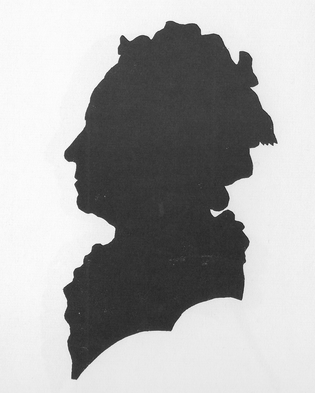 Bernhard Albrecht Moll (1743–1788): Die verwitwete Mutter des Künstlers, Johanna Josepha Walpurga geborene Hefele (1719–1792). Royal Ontario Museum, Toronto.